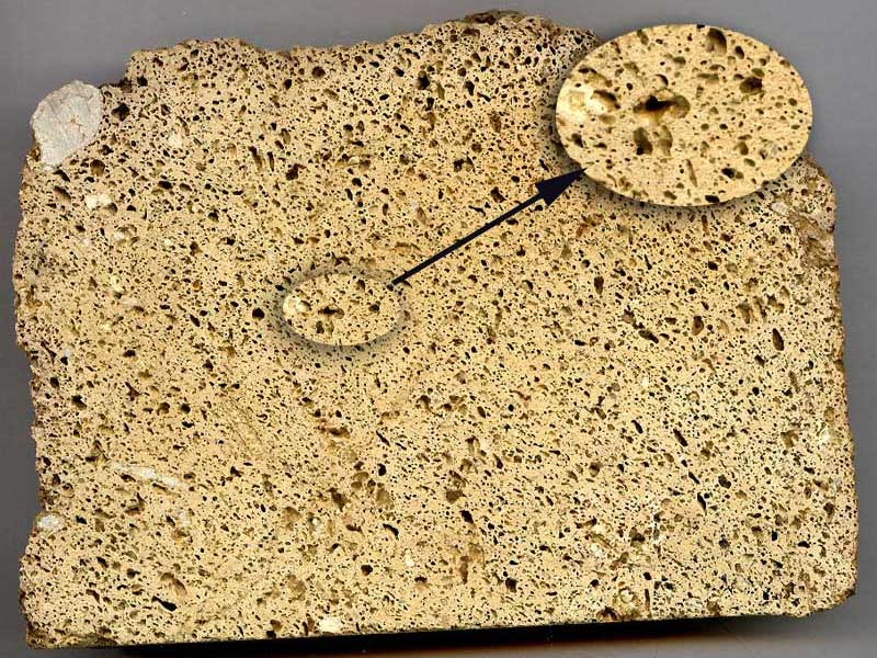 Fragment de brèche d'impactite du cratère d'impact de Rochechouart (France). Brèche à forte fusion : type Babaudus Baubadus est un lieu-dit situé au centre de l'impact. L'échantillon montre une matrice présentant un taux de fusion extrème. La roche a complètement fondu, et seul les cristaux de quartz ont subsisté. Les bulles nombreuses dont la taille varie du millimètre au centimètre ont été générées par une température de plusieurs milliers de degrés. Dimensions : 105 x 145 mm